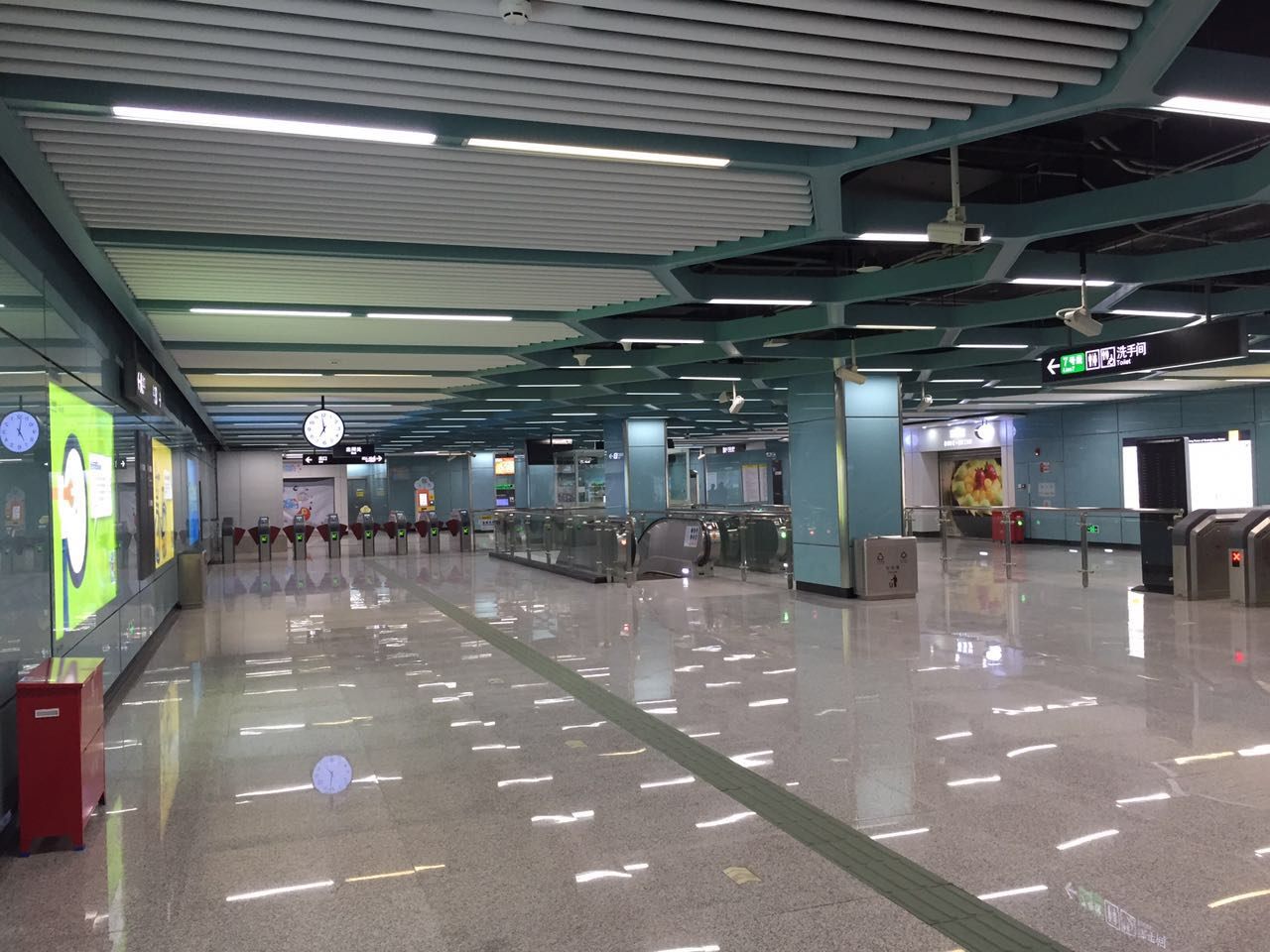 广州地铁谢村站